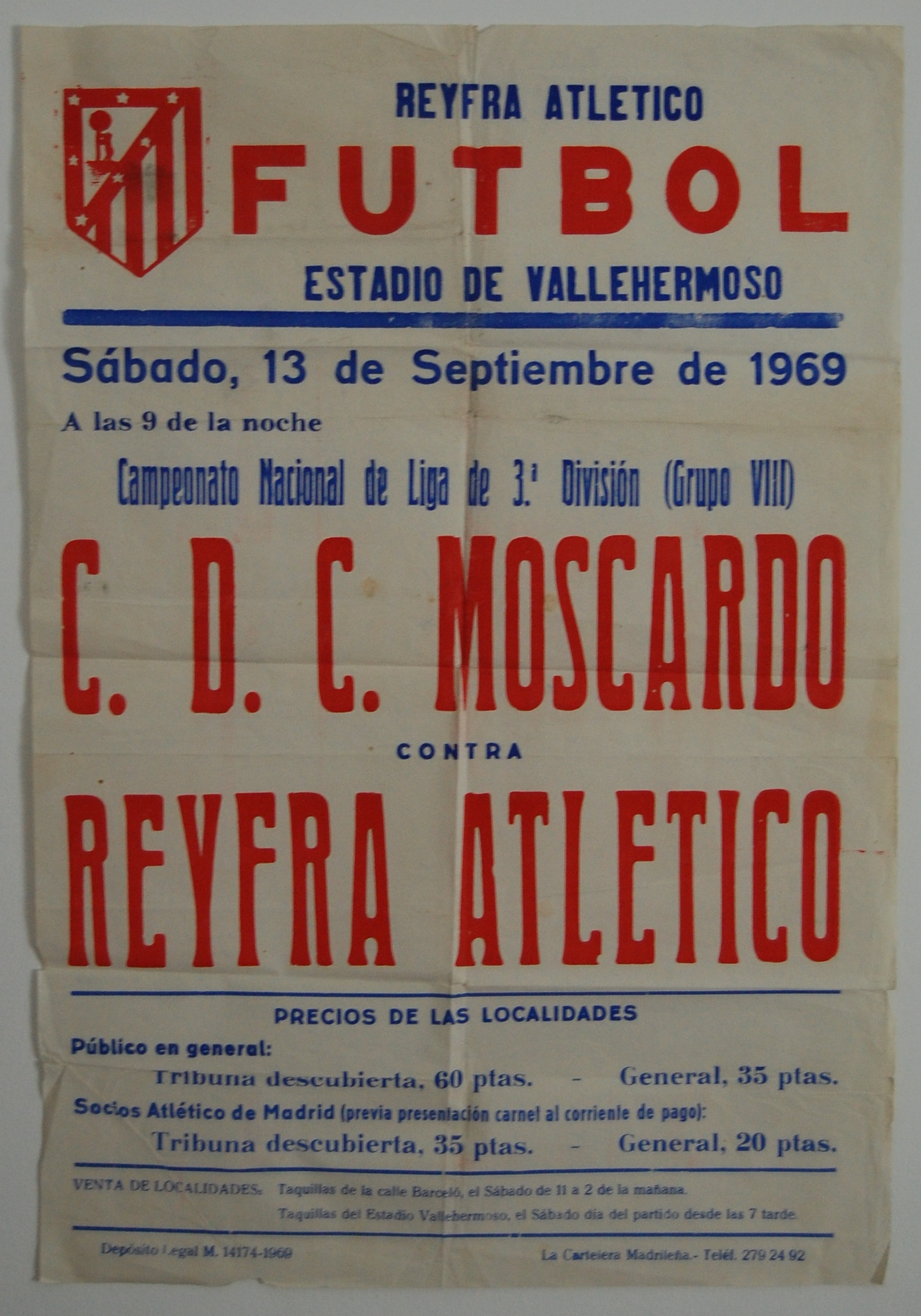 Cartel del año 1969 Reyfra Atletico vs CDC Moscardo